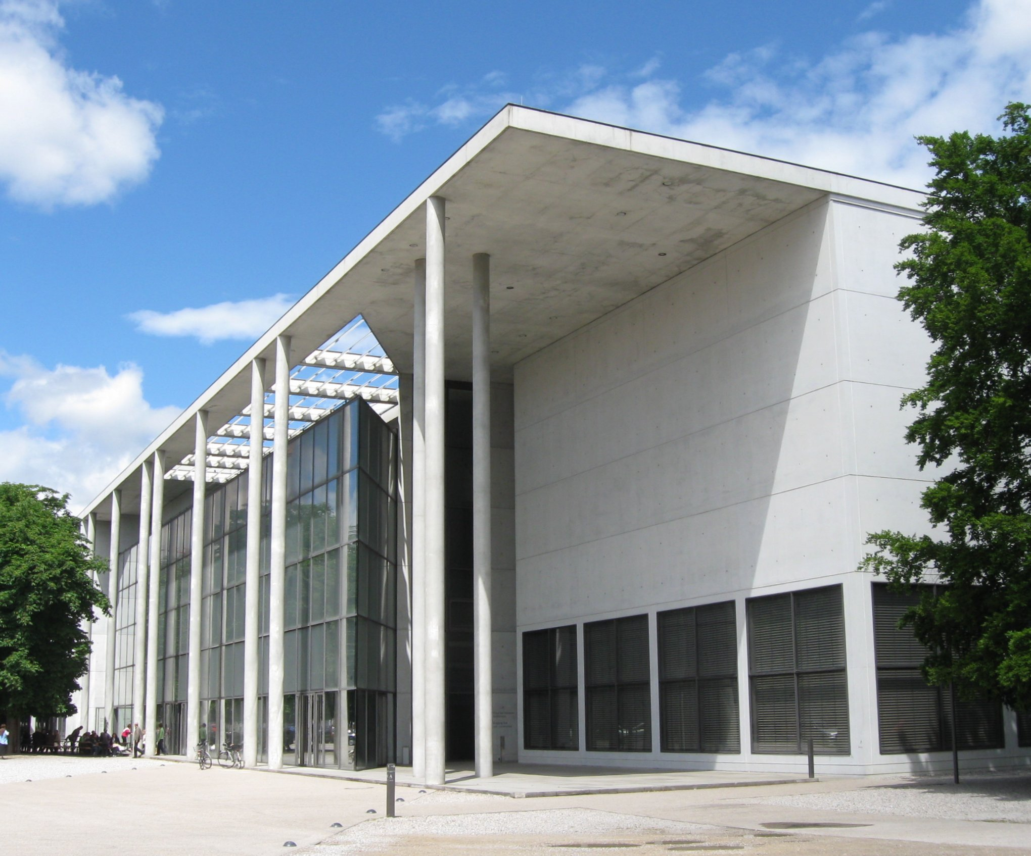 Pinakothek der Moderne, von SO gesehen